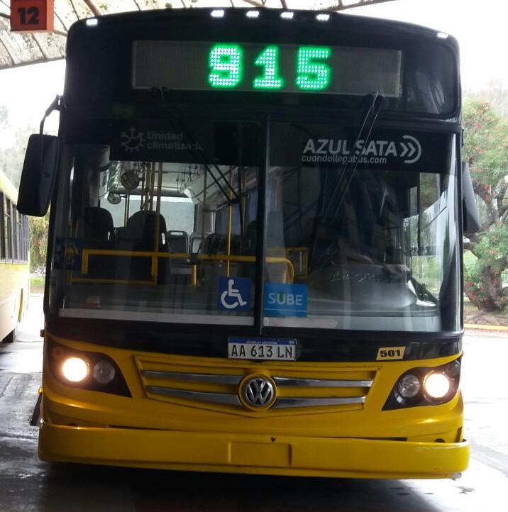 Volkswagen de la línea 915, de la empresa Azul SATA